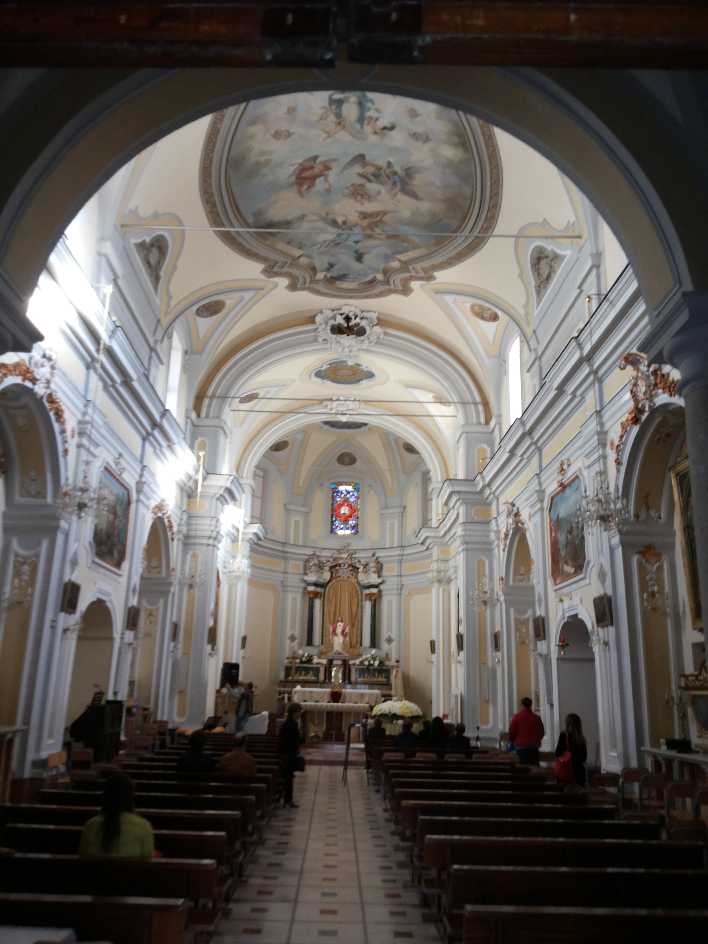 Interno della chiesa di Santa Maria di Gesù (Alcamo)